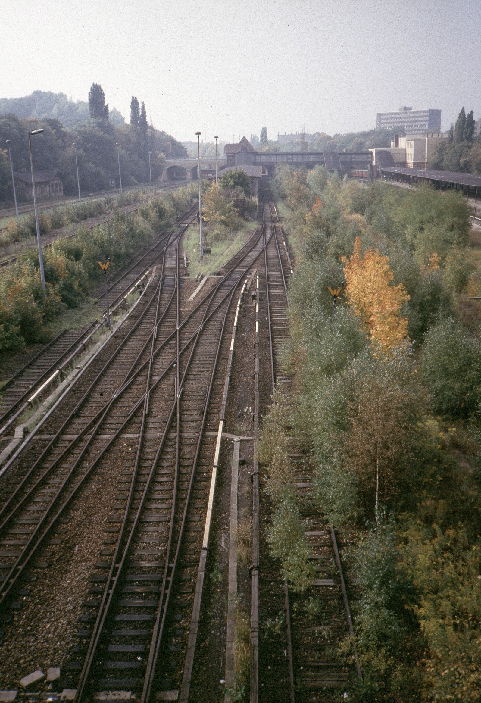 Bahnhof Berlin Gesundbrunnen von der Swinemünder Brücke Richtung Westen, der Ringbahnsteig ist zum Aufnahmezeitpunkt seit sechs Jahren außer Betrieb. Im Vordergrund liegt die Anbindung der für Berlin typischen zweigleisigen Kehranlage. Auf dem Grünstreifen zwischen Ring- und Nord-Süd-Bahnsteig befand sich der zum Aufnahmezeitpunkt schon länger abgebrochene Fernbahnsteig.